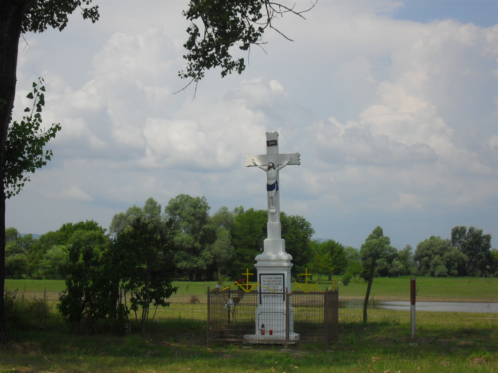 Balassagyarmat - feszület Újkóvár közelében, a 22-es főút mentén